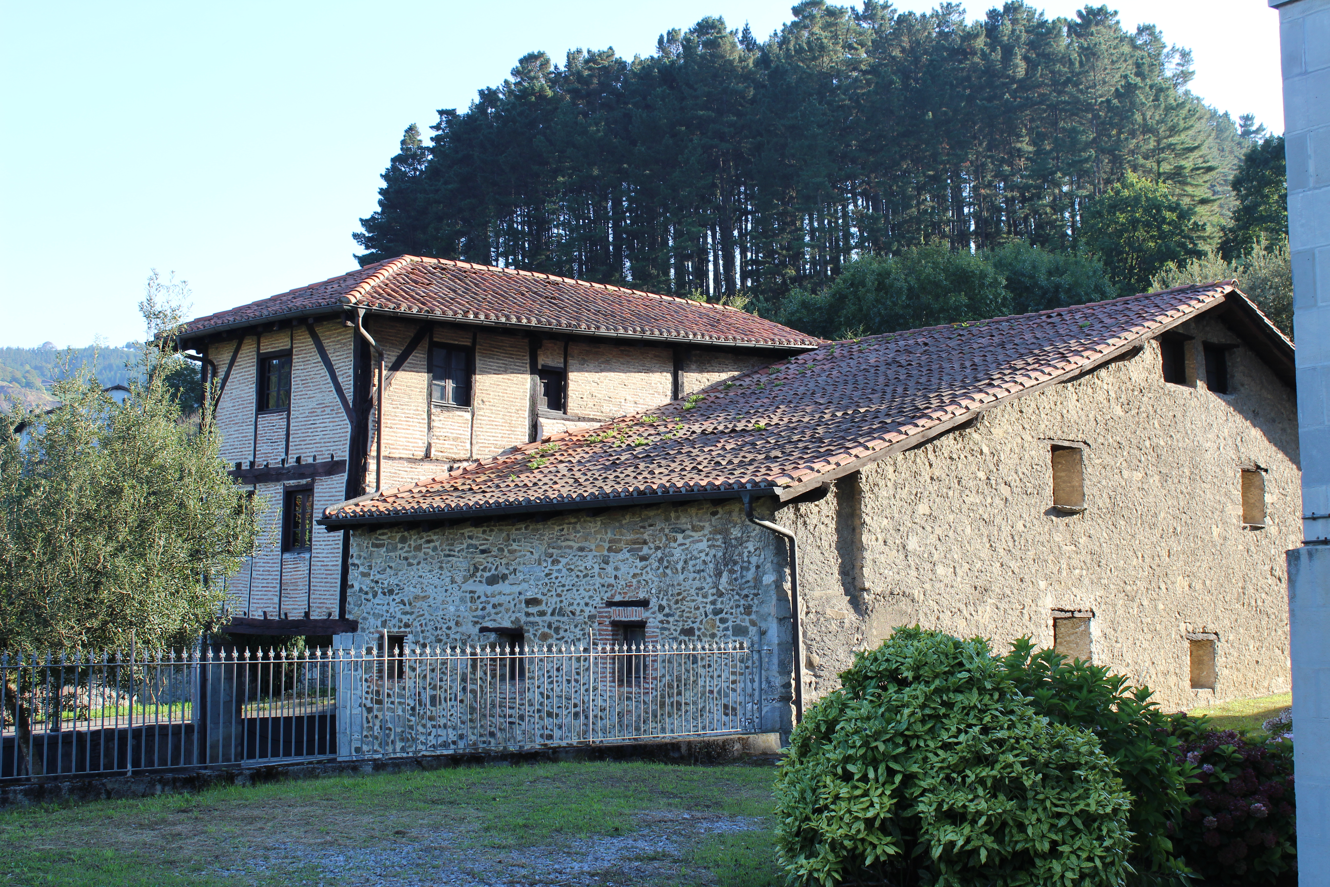 Garate anaiaren etxea, ukuiluarekin